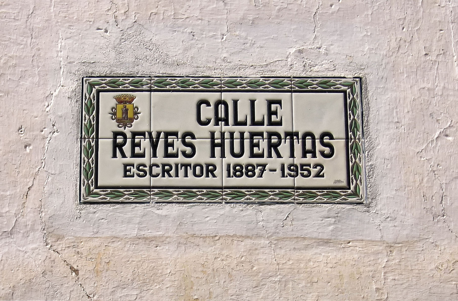 Placa de la Calle del escritor Antonio Reyes Huertas en Campanario (Badajoz) - Extremadura (España)